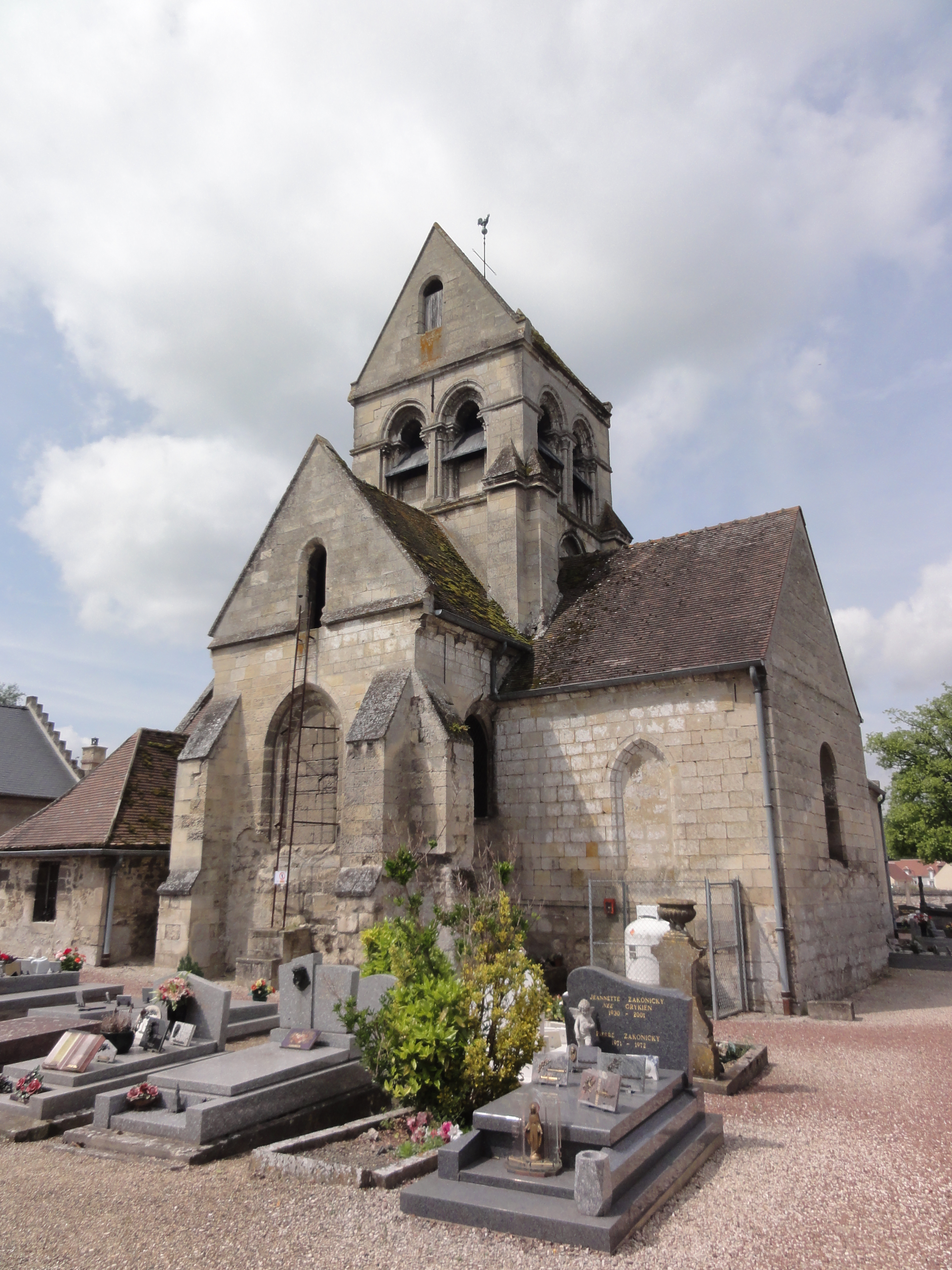 Couloisy (Oise) Église .